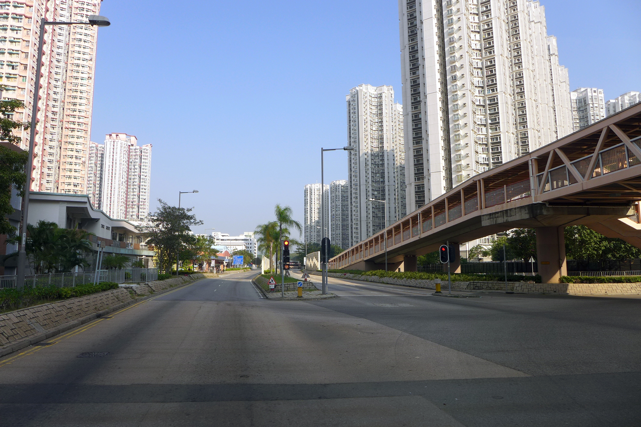 Tin Wah Road